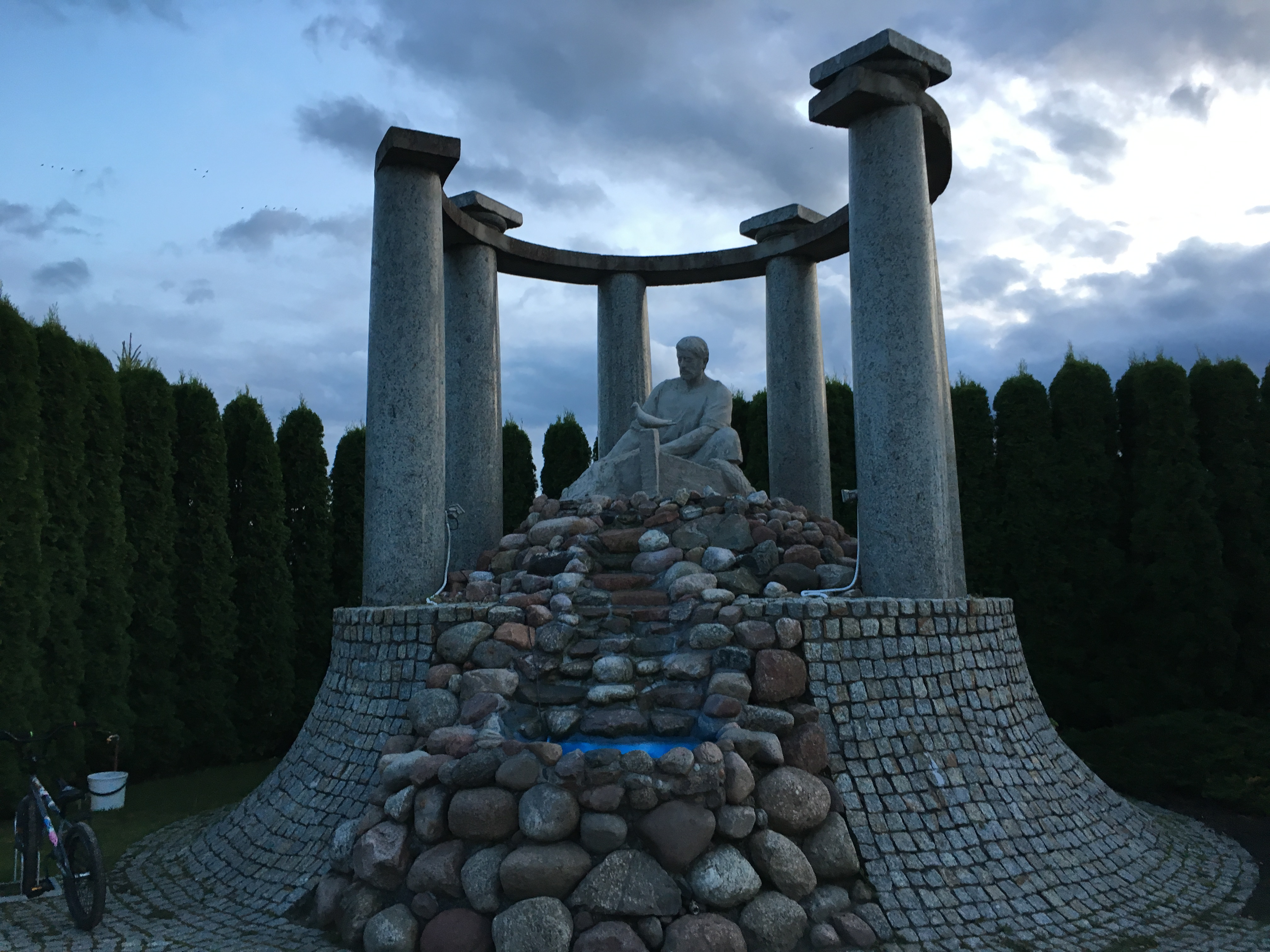 Pomnik Piotra Rybaka przy kościele NMP Matki Kościoła w Starogardzie Gdańskim